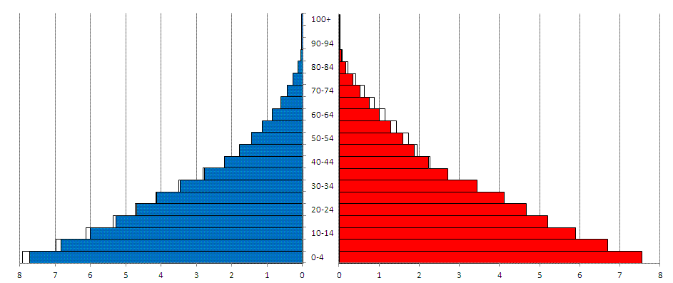 Piramida wieku i płci mieszkańców Afryki w 2011 za